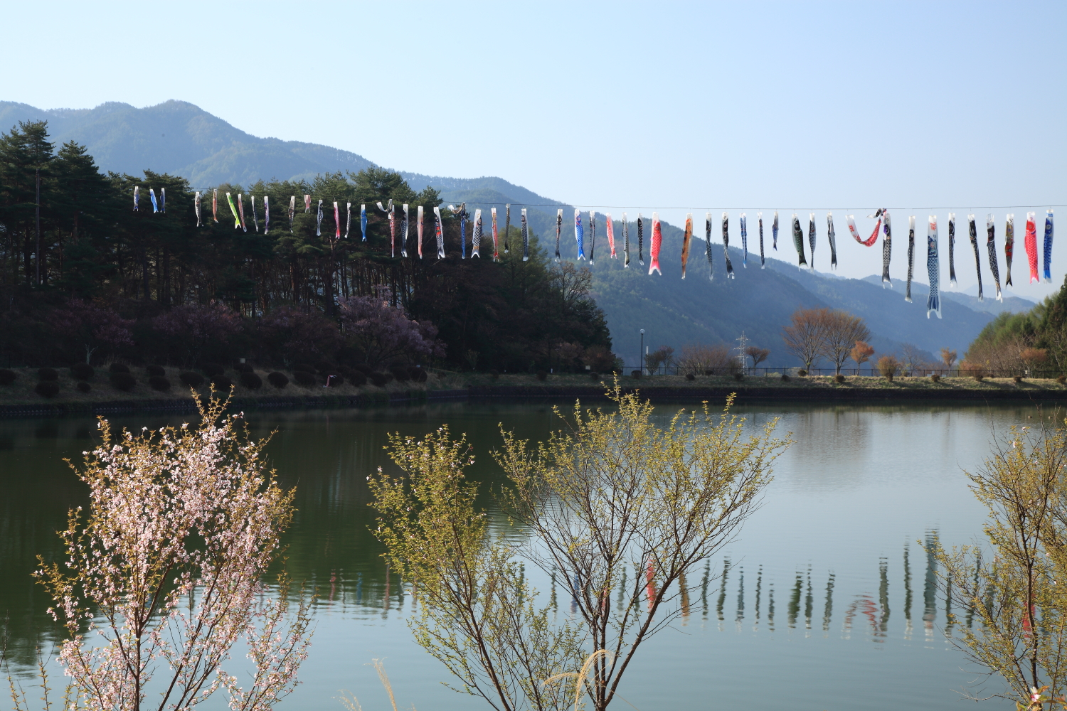 荒神山公園（上伊那郡辰野町、2012年）